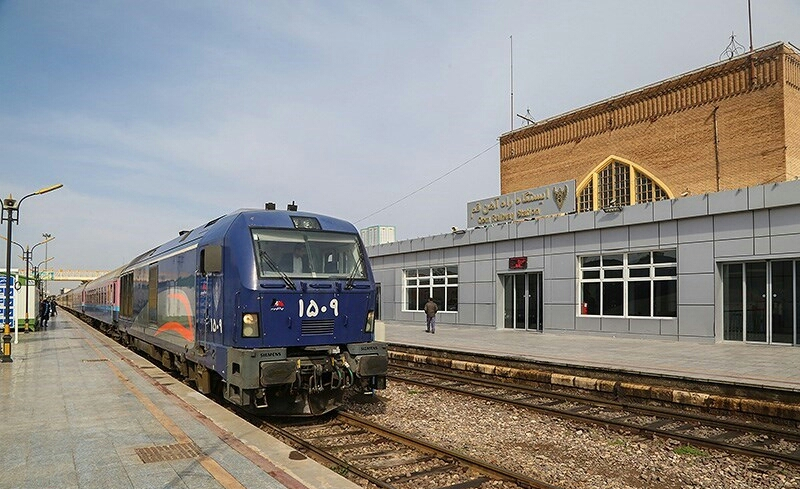 ایستگاه راه‌آهن قم - اسفند ۱۳۹۷